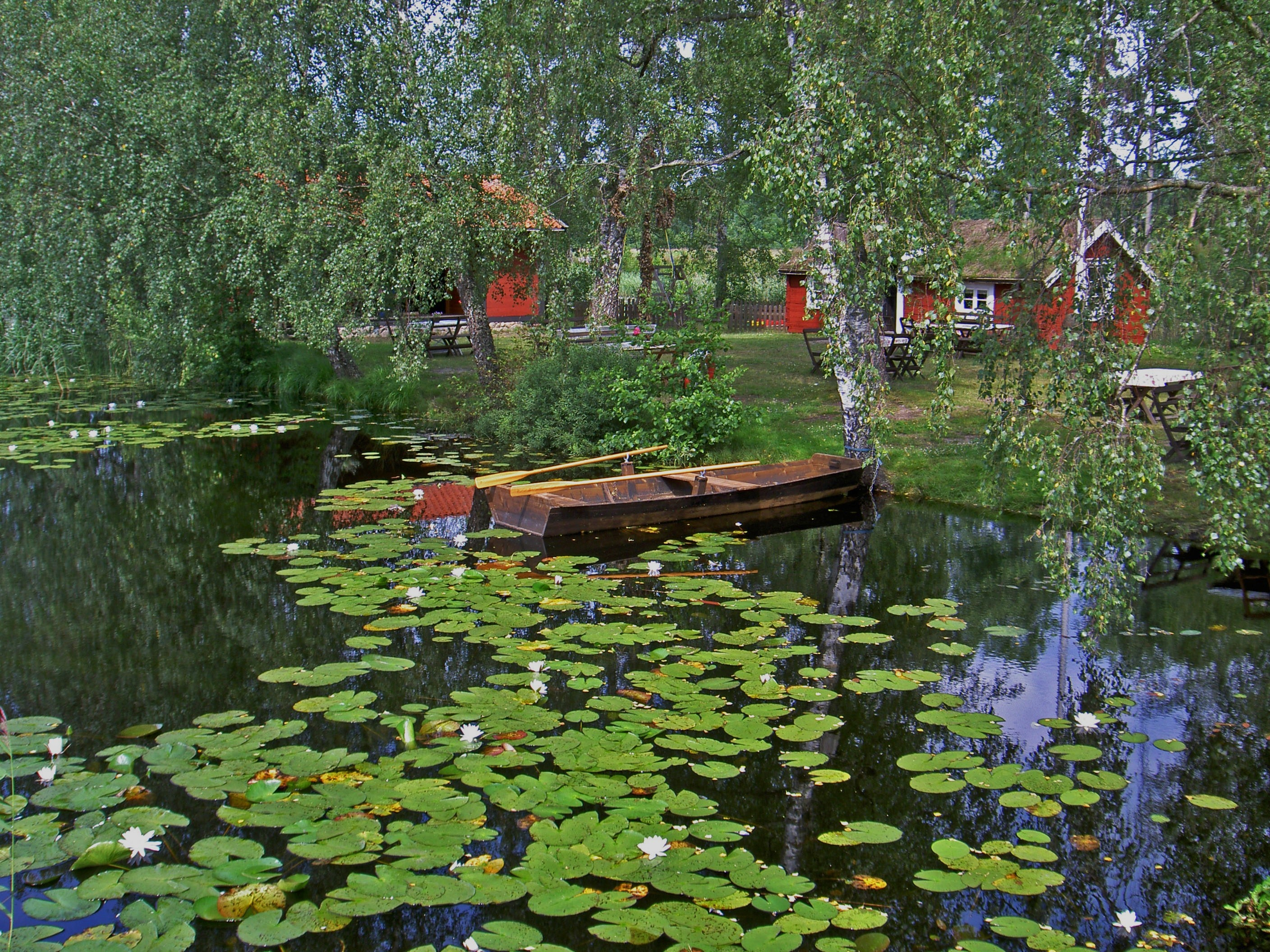 Kaffestugan på Hembygdsön i Holmsjö